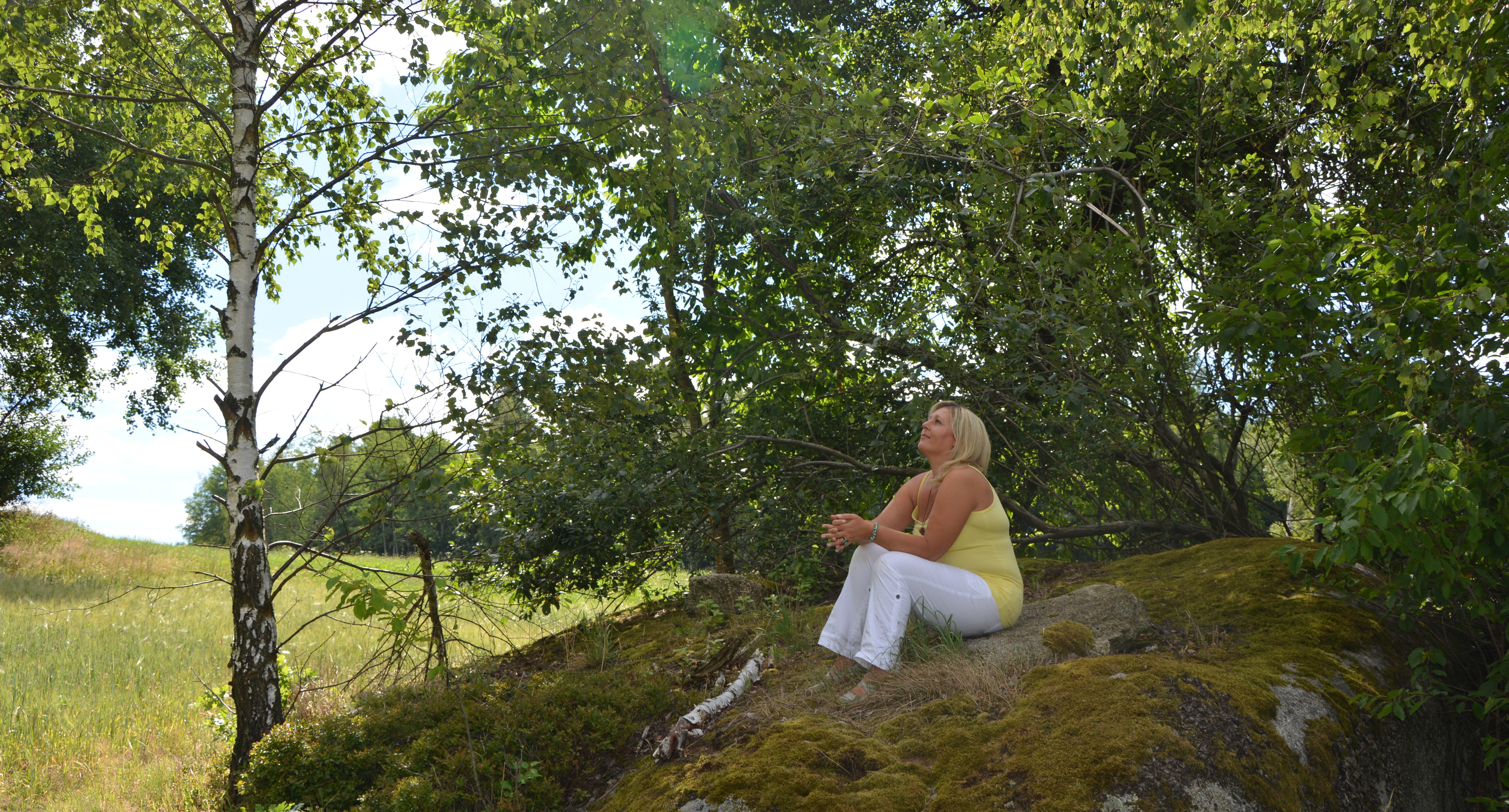 Heidenreichstein 2017 Eunike Grahofer